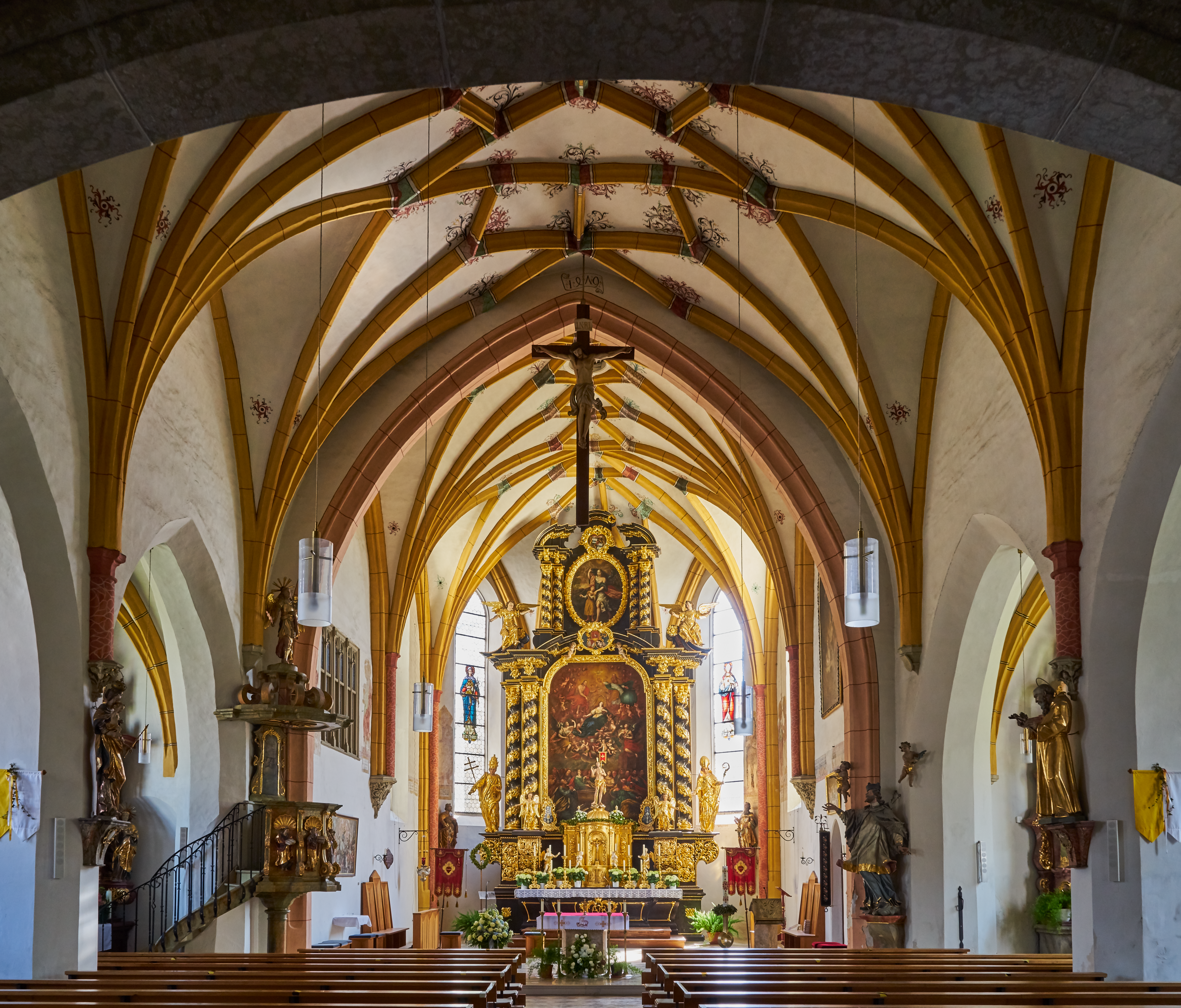 Pfarrkirche Mariä Himmelfahrt Rotthalmünster, Blick zum Chor